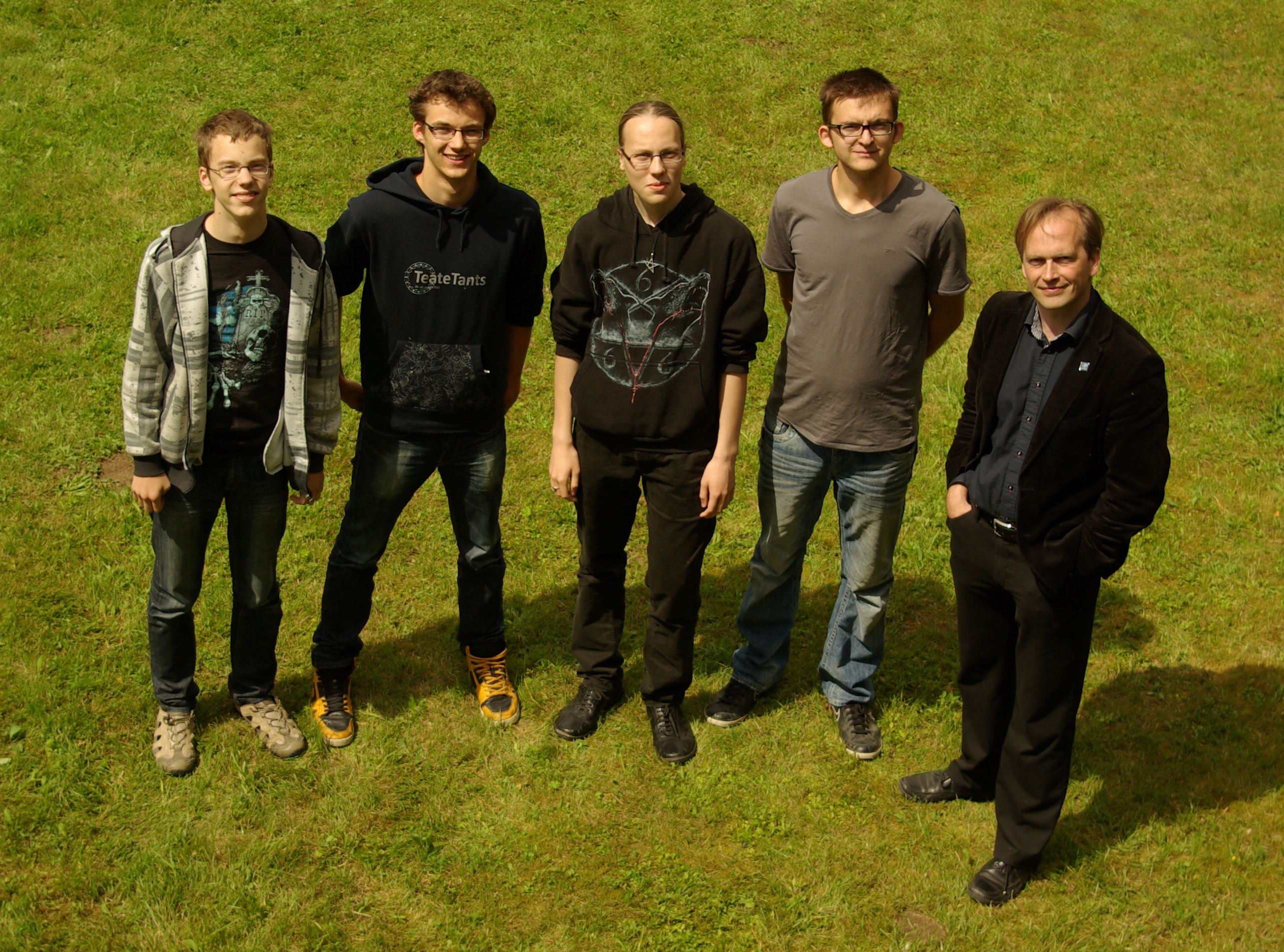 Teadusmalev 2012 osalejad Jürgen Laks, Mats Mikkor, Siim Kurvits, Simo Jarek Zaranek ning juhendaja Mart Noorma Eesti Füüsika Seltsi täppisteaduste suvekoolis 28. juunil 2012 Koppra talus Viljandimaal